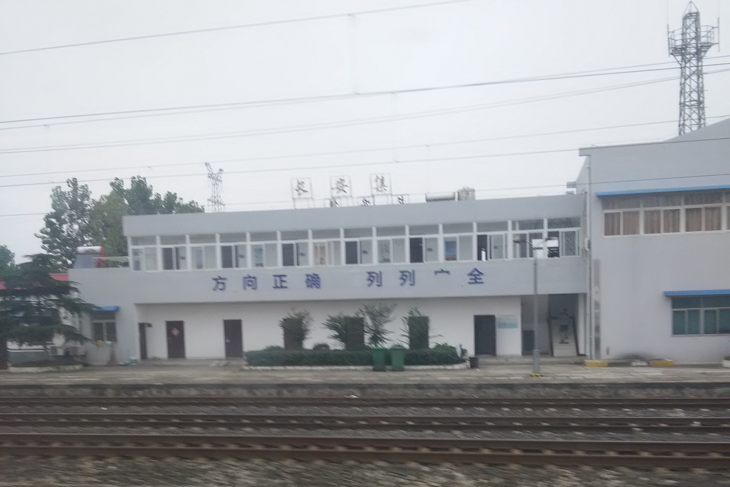 长安集站站房，摄于2016年7月14日